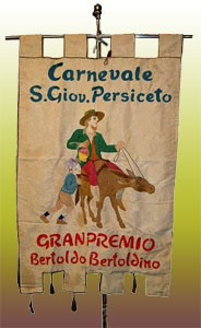 Gonfalon du grand prix Bertoldo e Bertoldino du Carnaval historique de San Giovanni in Persiceto (ville métropolitaine de Bologne, Émilie-Romagne, Italie)